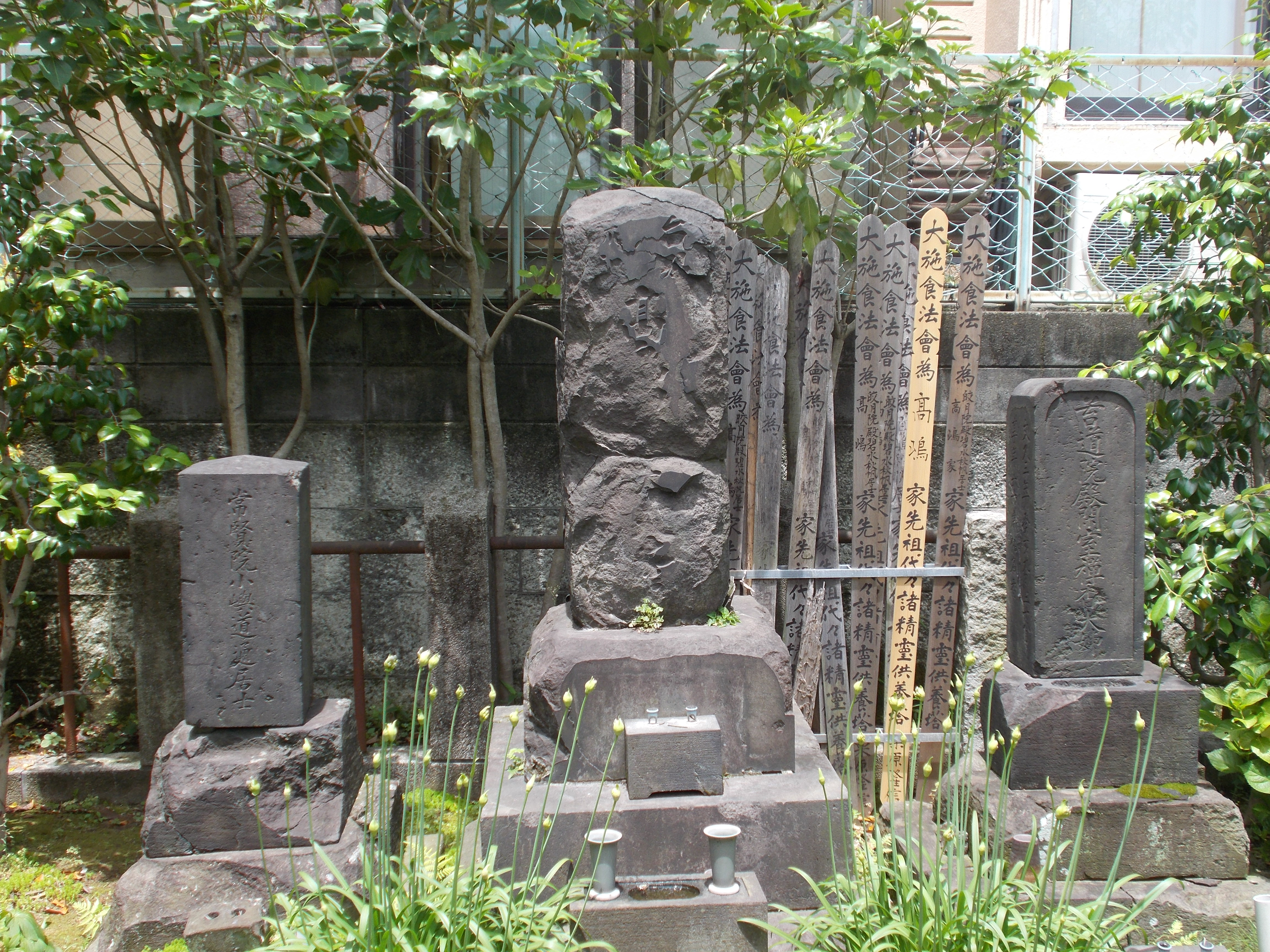 大円寺（東京都文京区）にある高島秋帆の墓